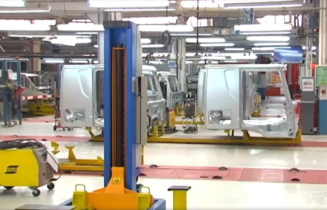 Juan Vicente Herrera visita IVECO Valladolid en el marco del Pacto por la Reindustrialización